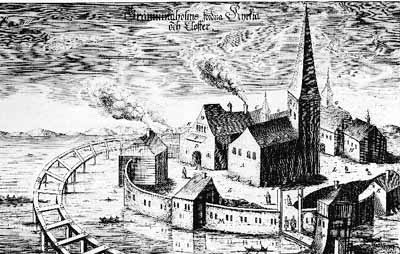 Gråbrödraklostret i sthlm